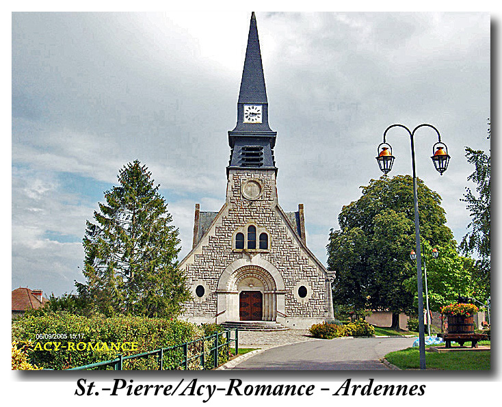 vue du parvis